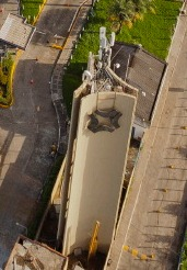 Vista aérea do totem da organização SINART, no Terminal Rodoviário de Salvador, em Salvador. Date=2012-08-21